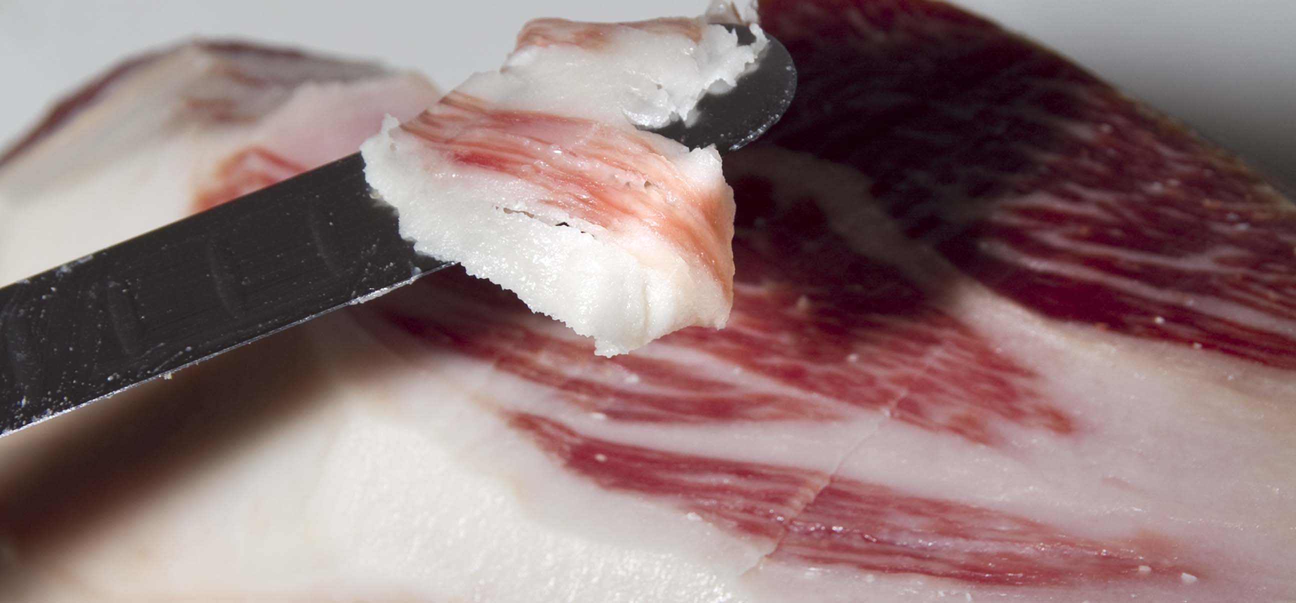 Jamón ibérico de bellota detalle corte de la empresa Jamón Or de Guijuelo, Salamanca